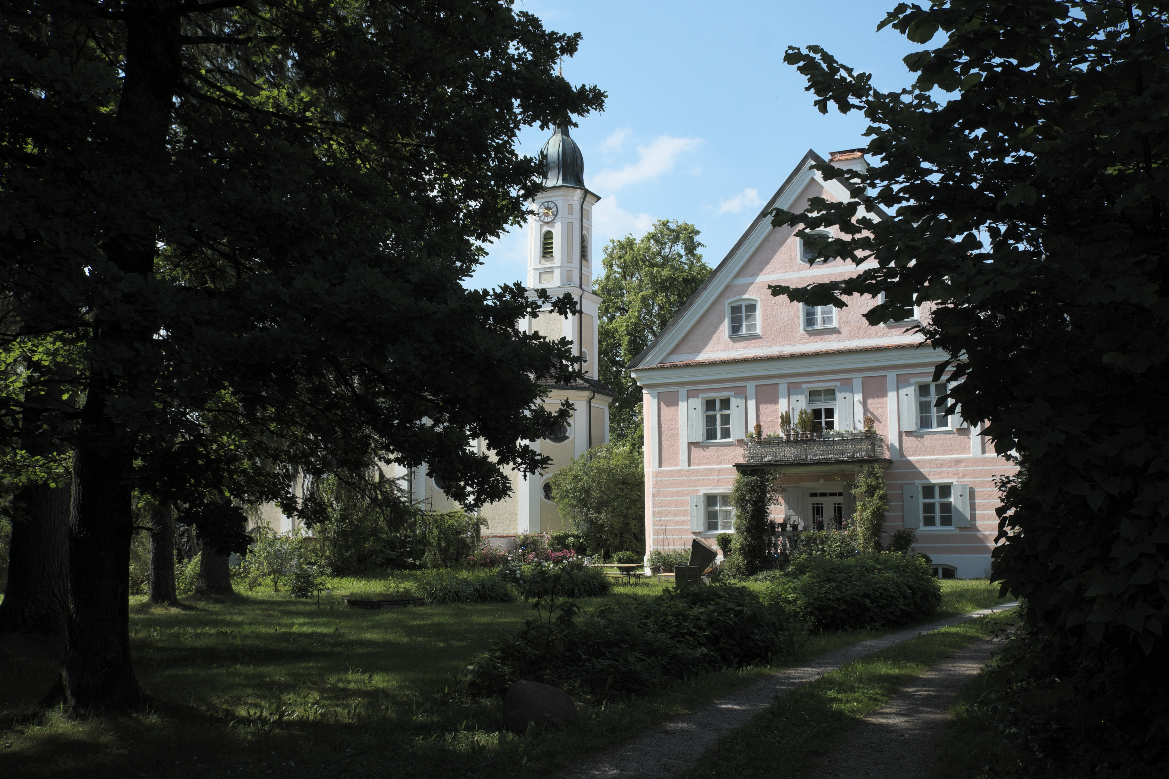 Schlösschen, auch Benefiziatenhaus, in Kreuzpullach (Oberhaching) im Landkreis München (Bayern, Deutschland)